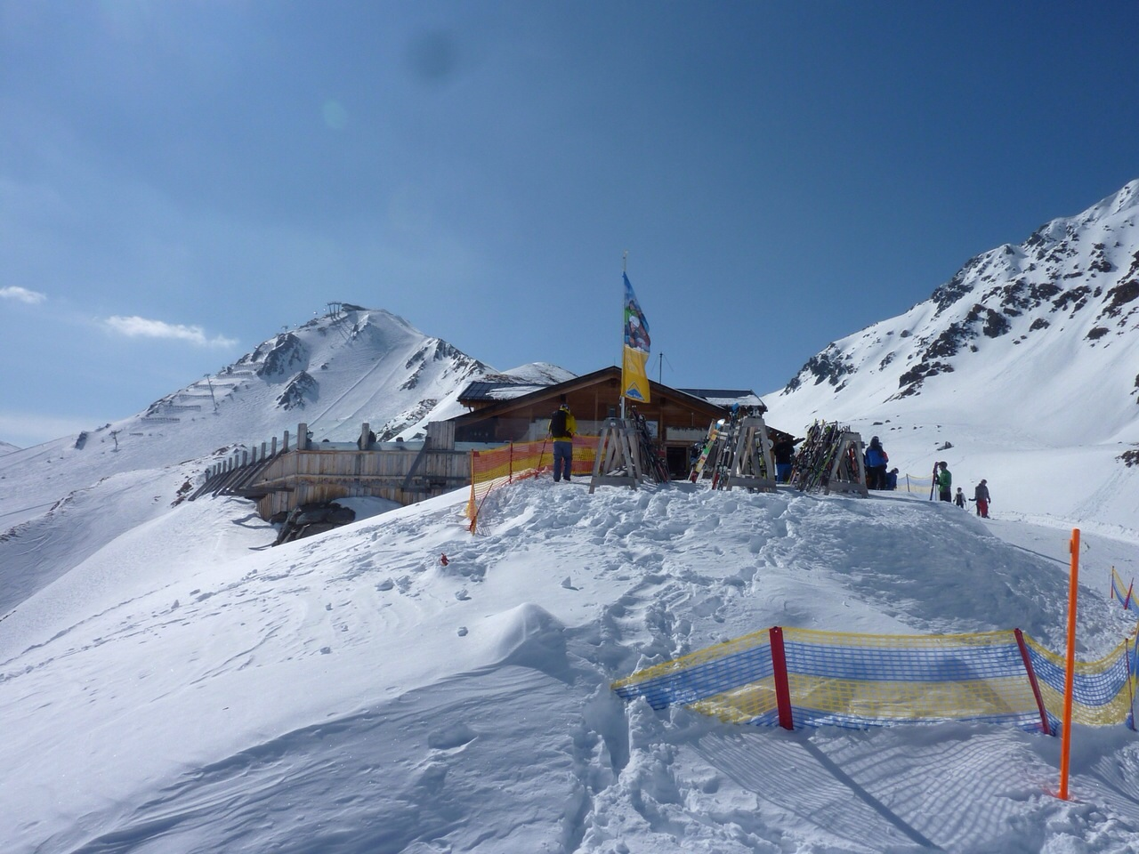 Die hexenseehütte im Winter 2015.